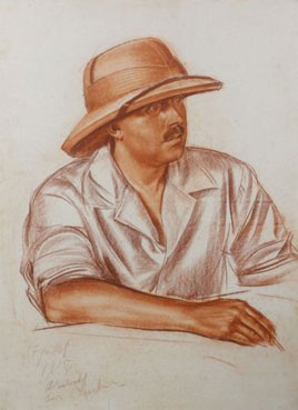 Louis Audouin-Dubreuil 1925 бумага, сепия 73.00/53.00 см